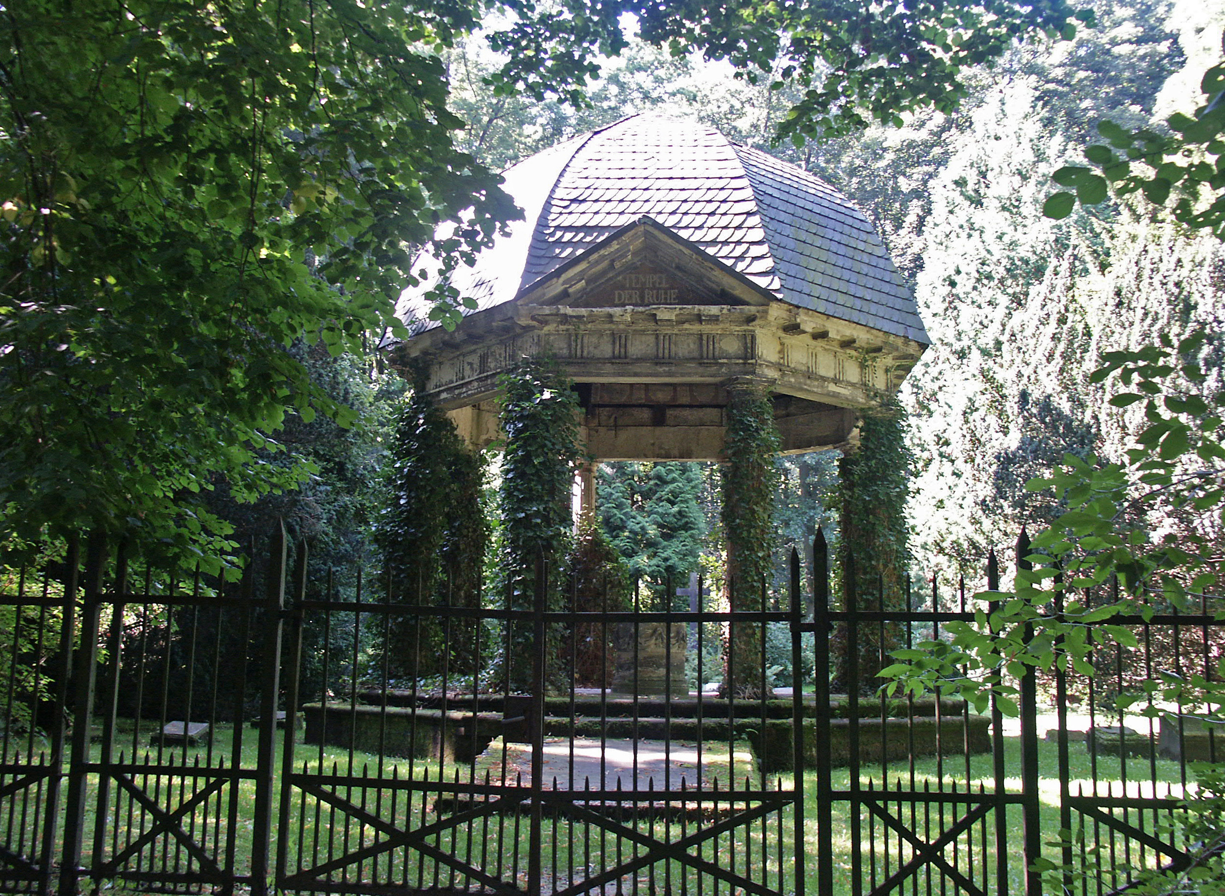 Das sogenannte Familienbegräbnis von Haus Bodelschwingh in Dortmund